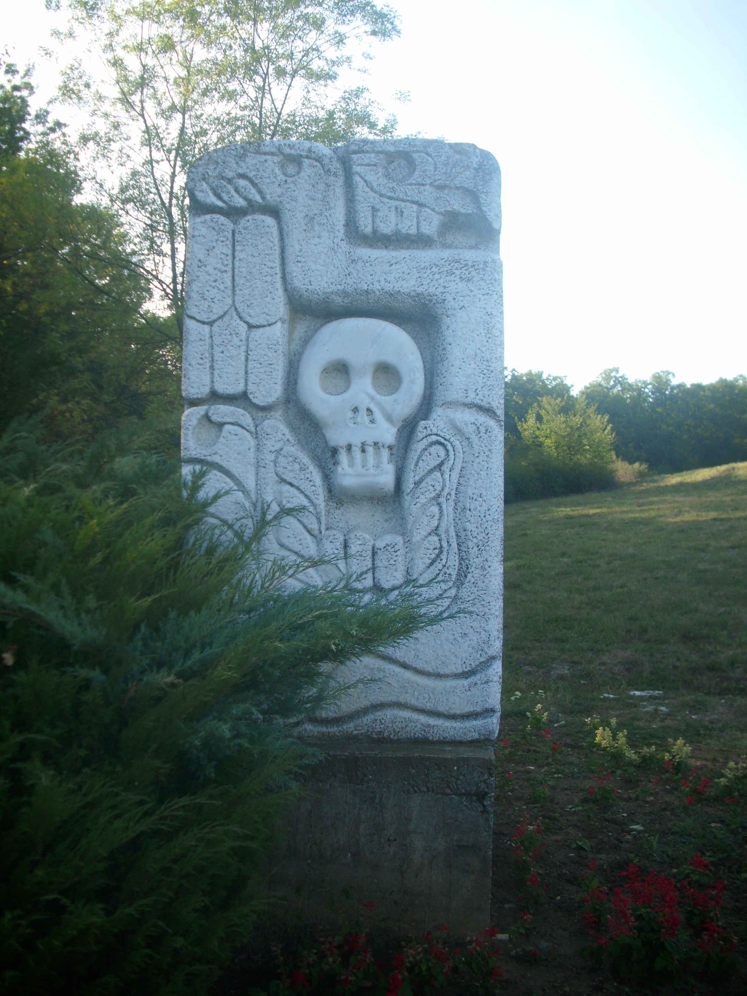 Споменик подигнут поводом педесетогодишњице стрељања у Шумарицама. Споменик Против зла (Мигуел Ромо-Мексико, вајар, 1991.) исклесан је у једном мермерном блоку уметничким стилом древног јужноамеричког народа Маја, али је његова тема хришћанска. Рељефном, разгранатом мрежом симбола из Апокалипсе, односно, Страшног суда, наводи на размишљања о праведној награди или казни за учињена дела.